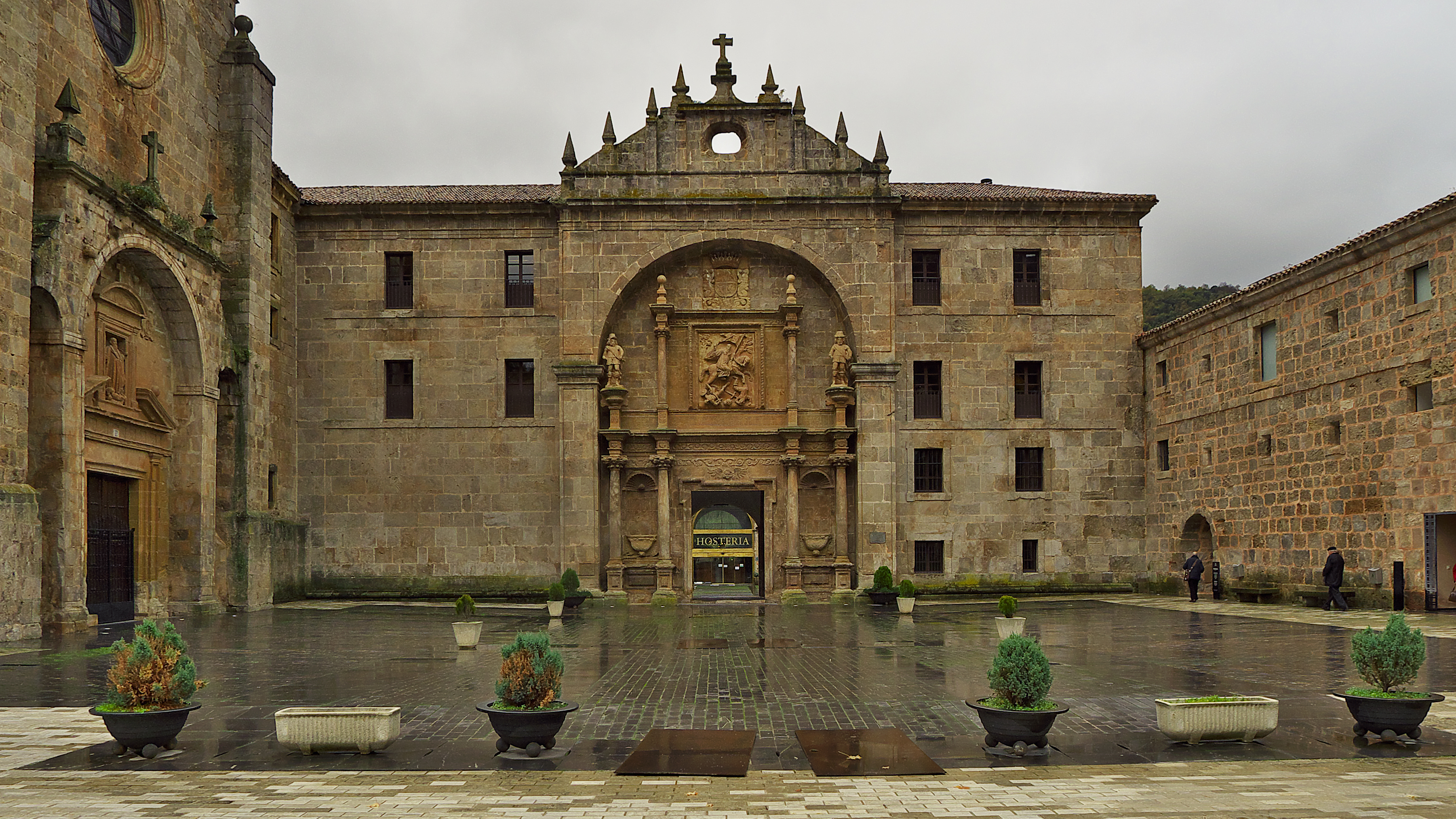 Acceso al monasterio, A la izquierda, puerta occidental o de los pies de la iglesia.